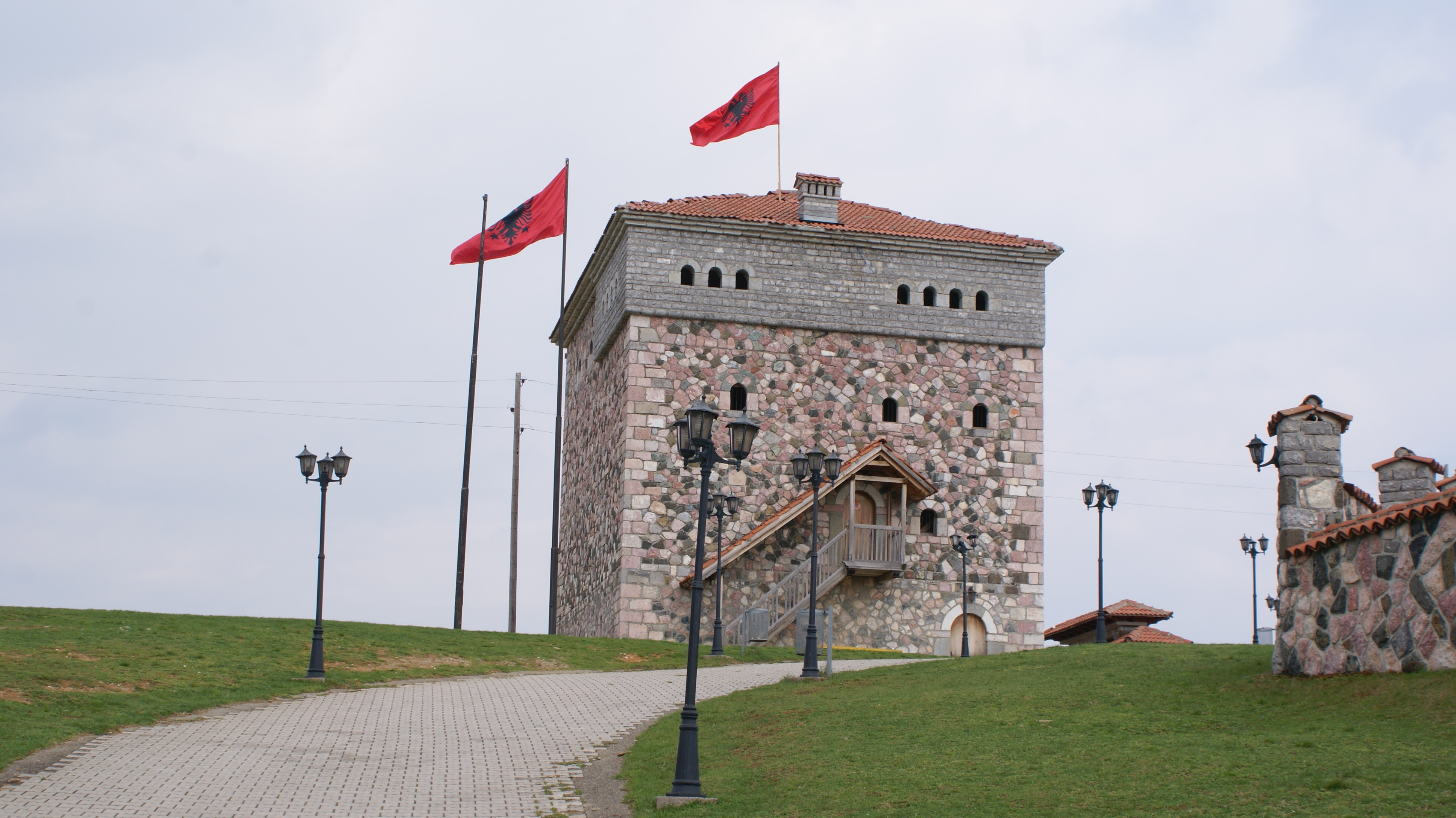 Kompleksi i Deshmorëve